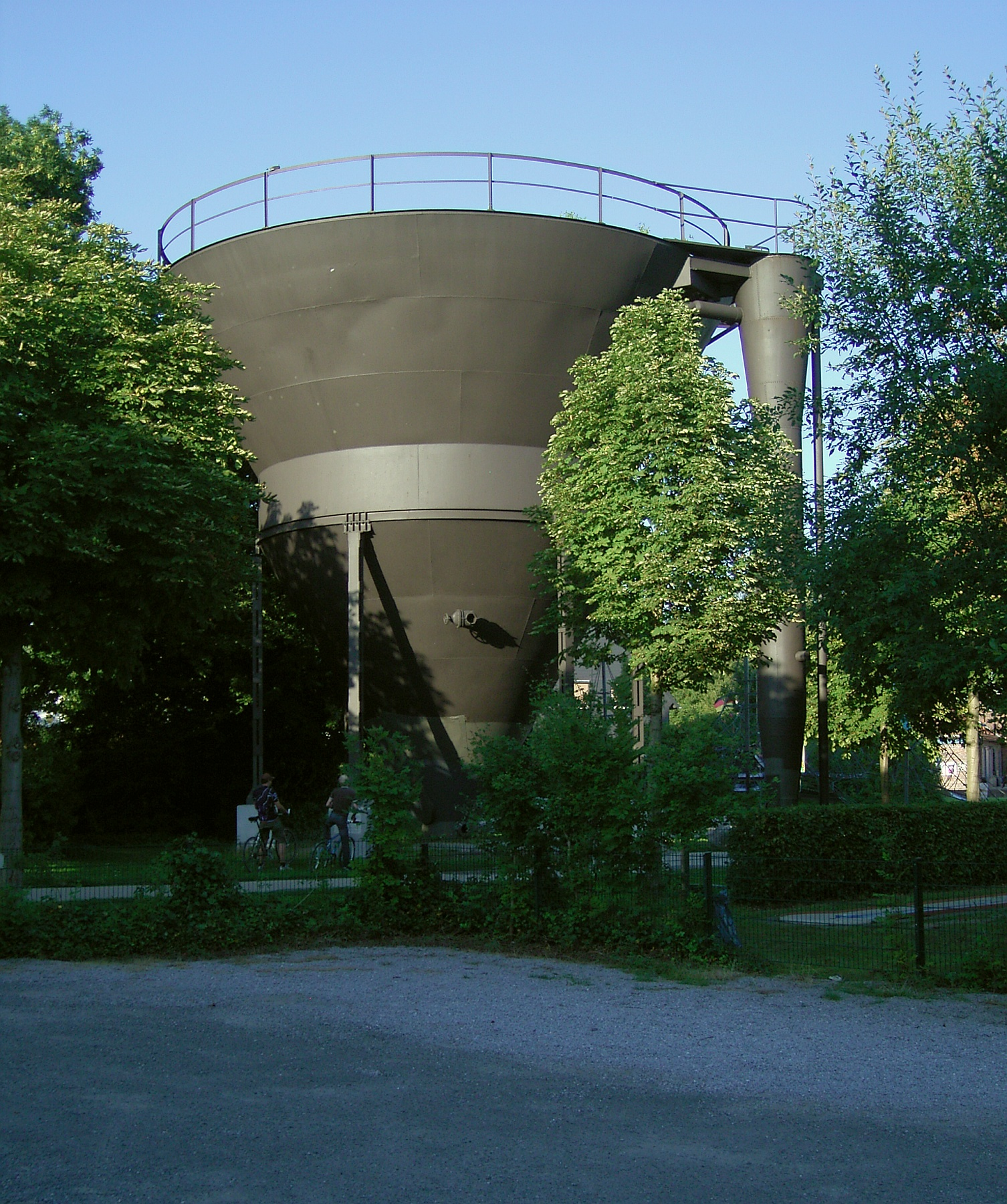 Der Fröndenberger Trichter (auch:Himmelmanntrichter), Nordrhein-Westfalen. Der Trichter diente der Rückgewinnung von Rohstoffen aus Abwässern der Papierherstellung